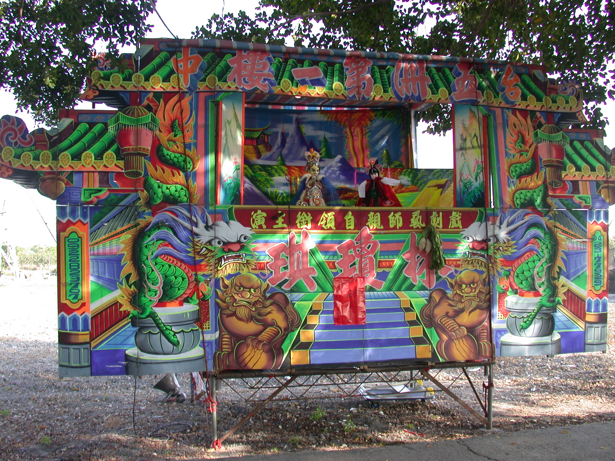 Bân-lâm-gú: 歲次己丑年(2009)正月初四吉旦，恭祝福德正神千秋，信士吳明賢、吳明佳一同敬謝神恩。地點：臺灣臺中縣潭子鄉甘水路二段路邊土地公廟。領銜主演：臺中五洲第一樓林瓊棋。